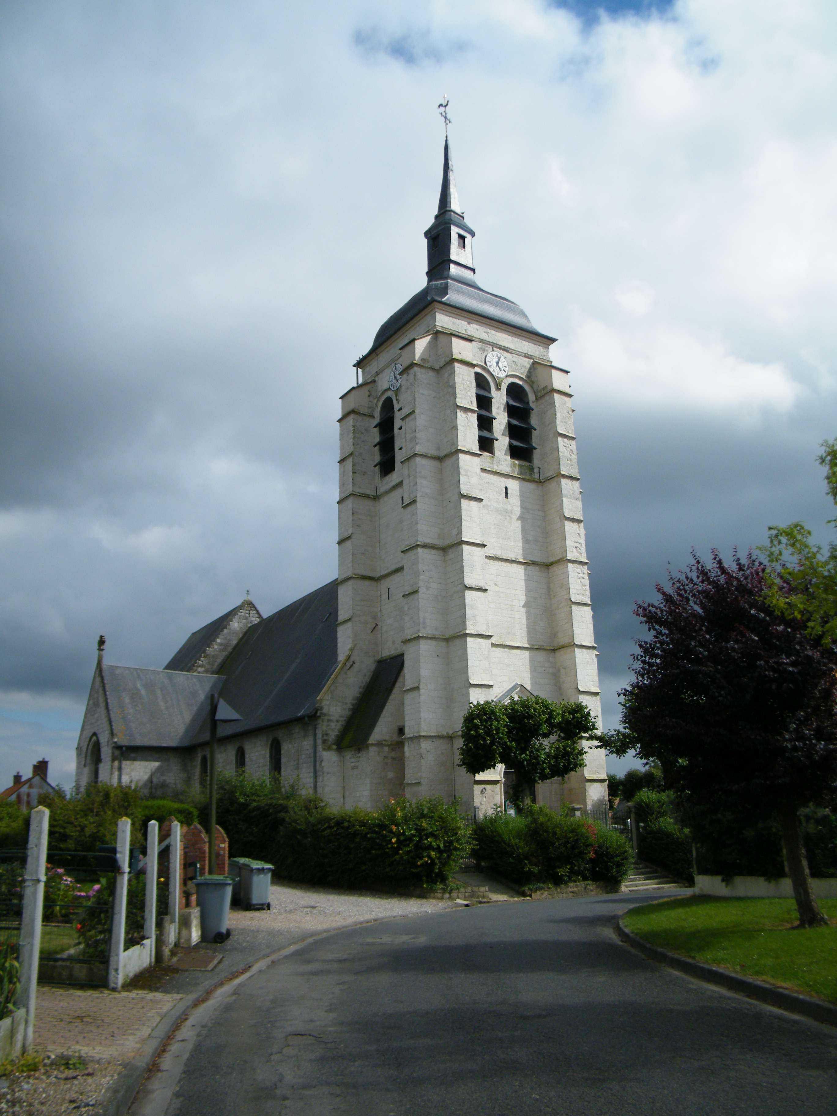 Clocher